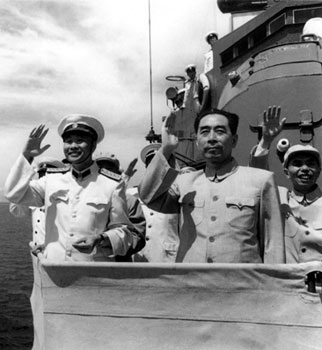 1957年“八一”建军节，萧劲光陪同周恩来在青岛检阅海军舰艇部队